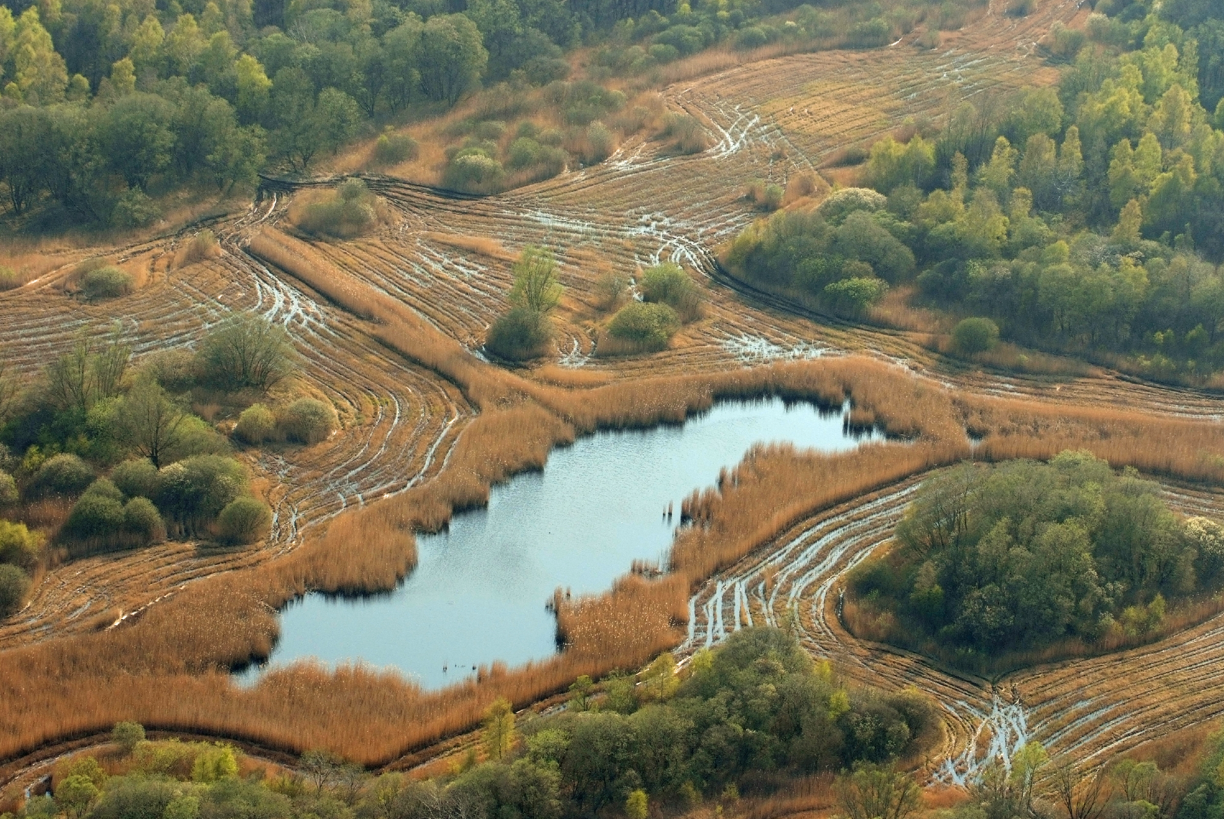 Fotoflug von Nordholz-Spieka nach Oldenburg und Papenburg